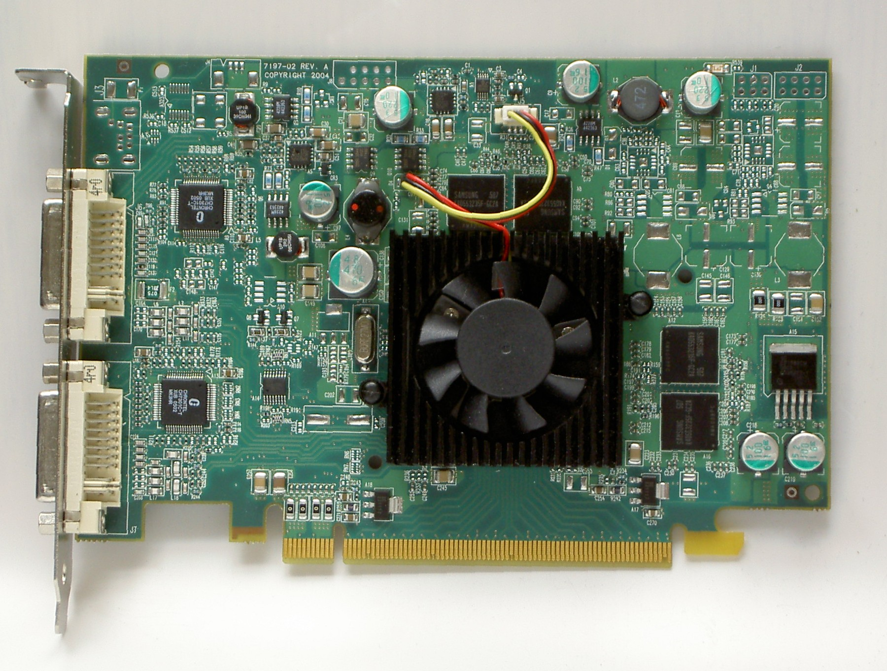 Matrox Millennium P650 PCIe (128MB)